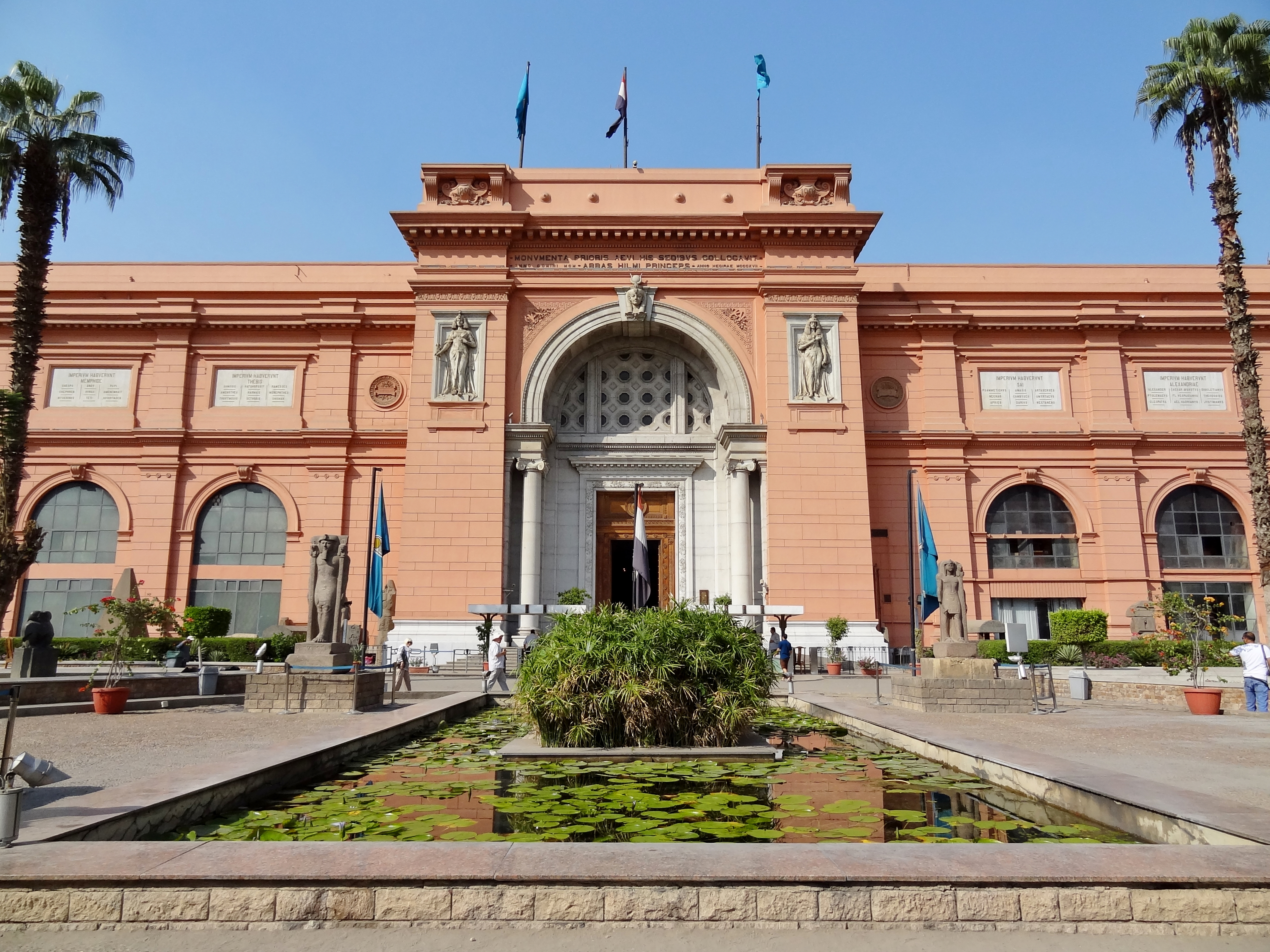 Eingang zum Ägyptischen Museum am Tahrir-Platz in Kairo, Ägypten